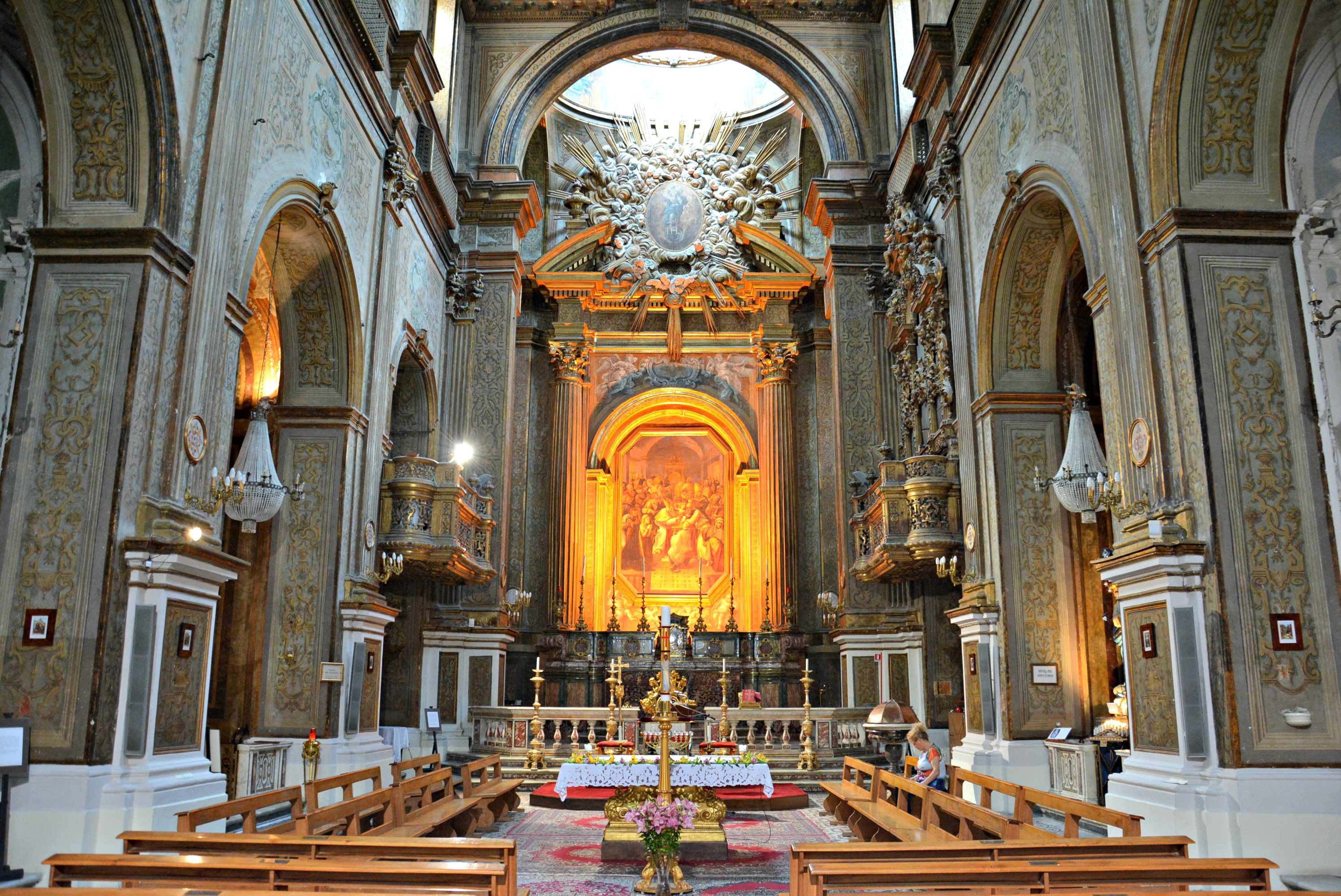 Vedi titolo